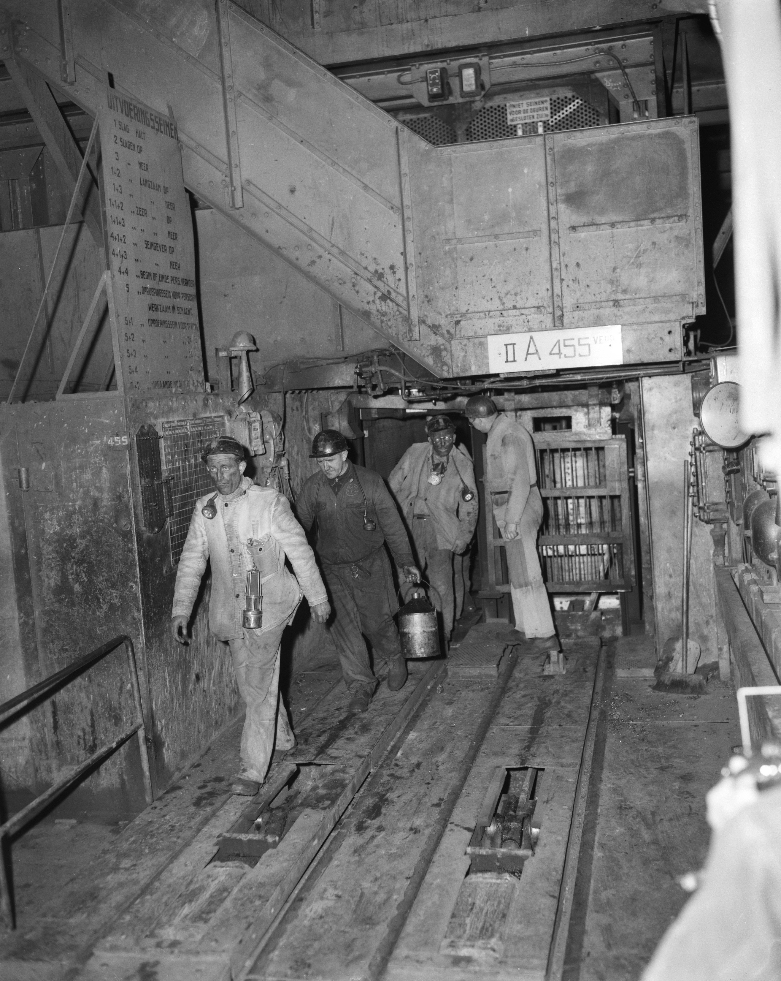 Collectie / Archief : Fotocollectie Anefo Reportage / Serie : [ onbekend ] Beschrijving : Een der reddingsploegen komt boven Datum : 4 maart 1958 Locatie : Heerlen Trefwoorden : mijnen, rampen, reddingsploegen Persoonsnaam : maurits Fotograaf : Behrens, Herbert / Anefo Auteursrechthebbende : Nationaal Archief Materiaalsoort : Negatief (zwart/wit) Nummer archiefinventaris : bekijk toegang 2.24.01.04 Bestanddeelnummer : 909-3816